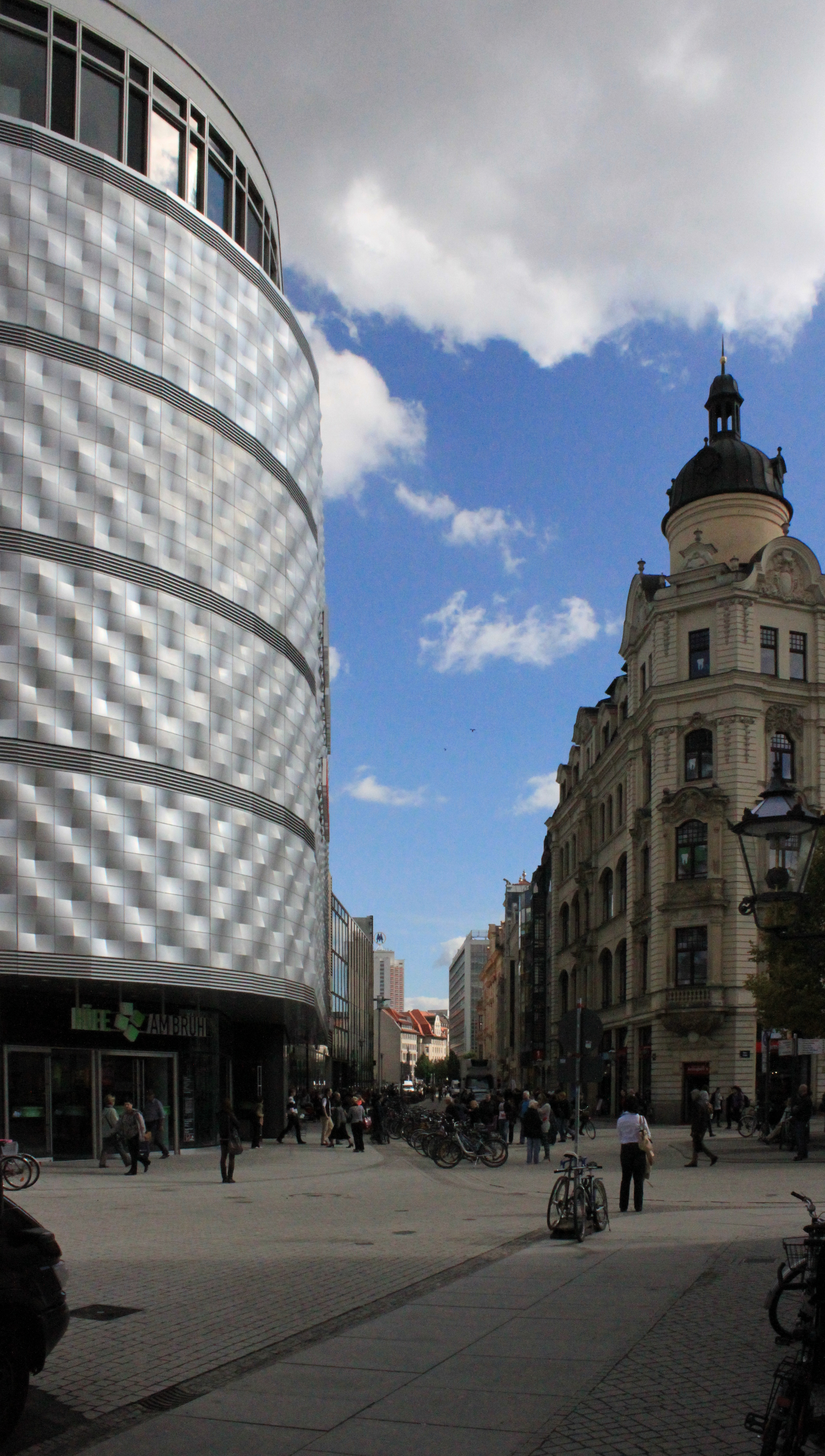 Brühl von West 2012 September